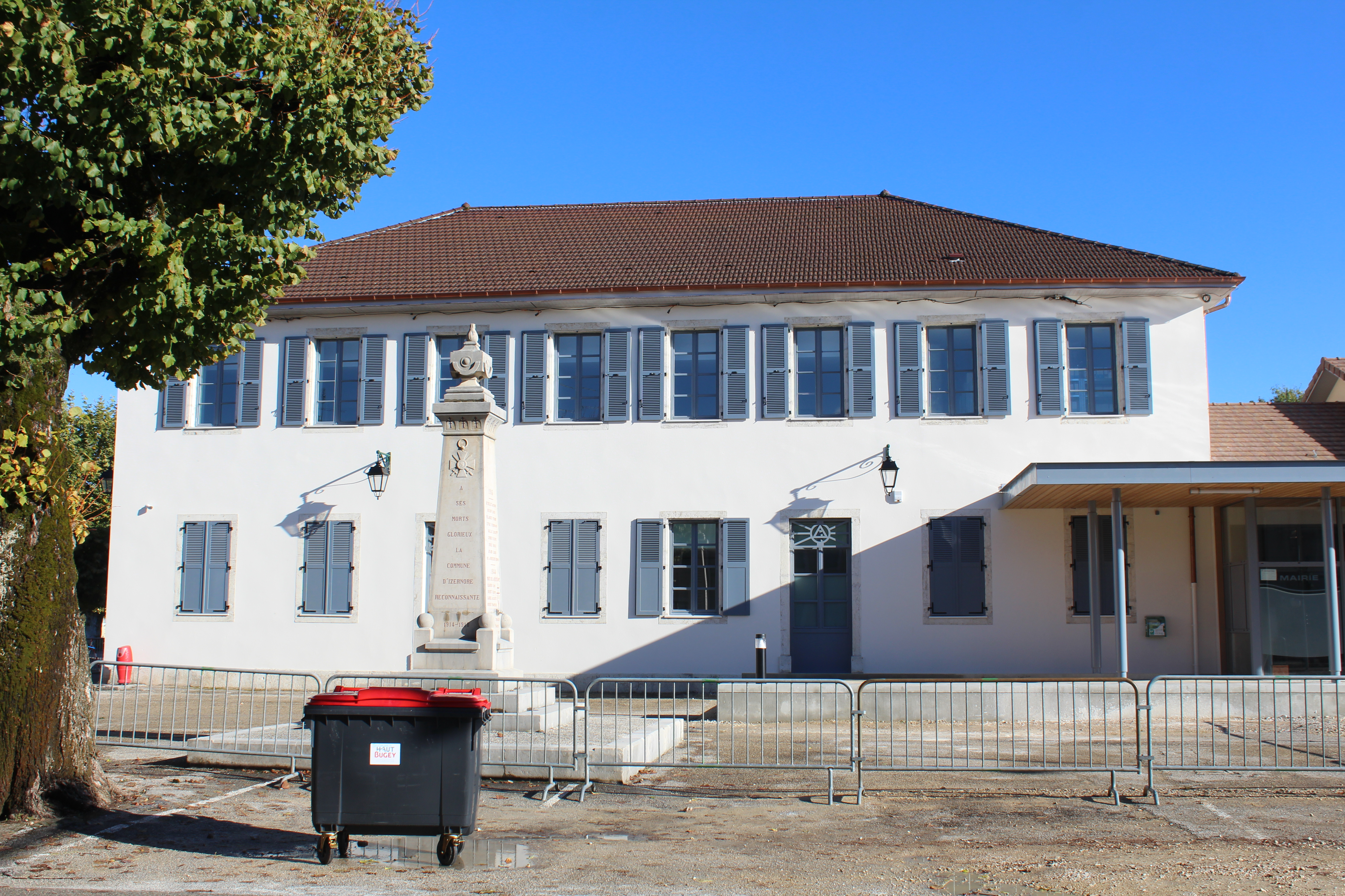 Mairie d'Izernore.